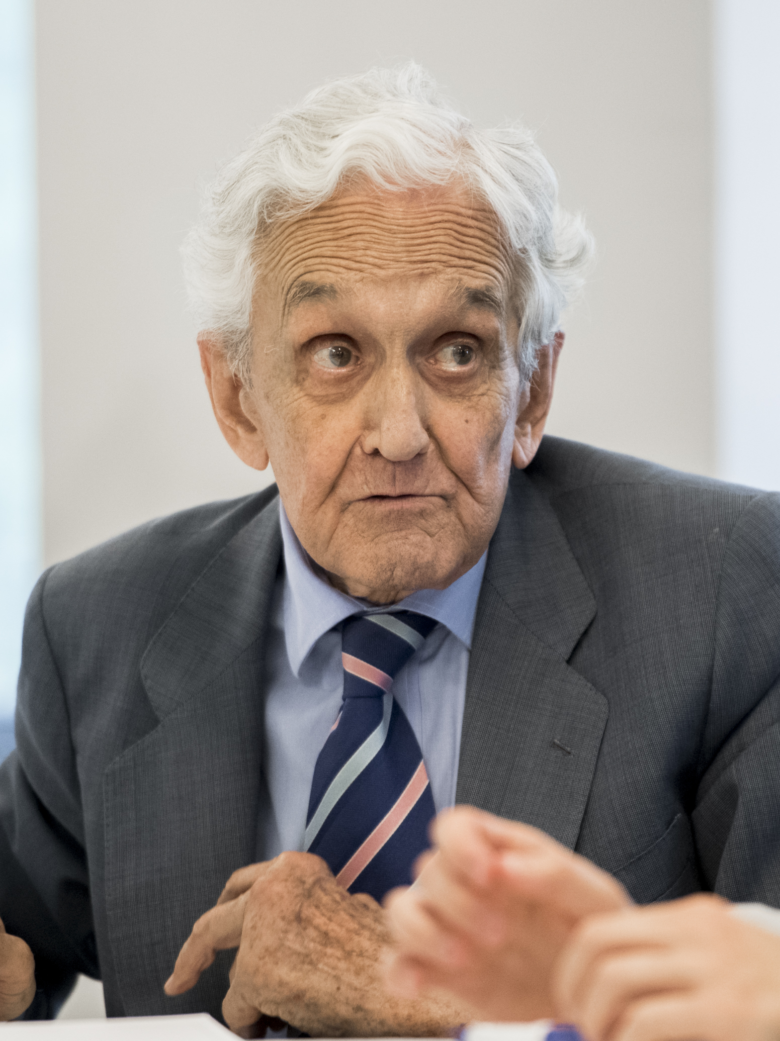 Reunión de Ayuso en la Sede del Partido Popular